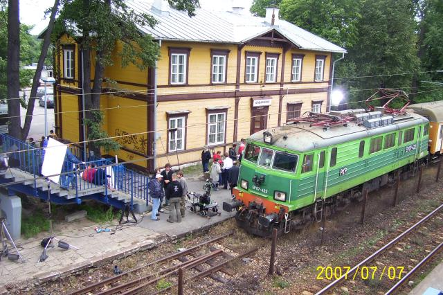 Dnia 7 lipca 2007 roku Celestynów zniknął z kolejowej mapy polski i zamienił się w "Dobaniewo". Wszystko za sprawą powstającego dla telewizji Polsat filmu i serialu o tytule "Skorumpowani". Sceny kręcone w Celestynowie mają kluczowe znaczenie dla fabuły i zobaczyć je można już w pierwszych minutach filmu.